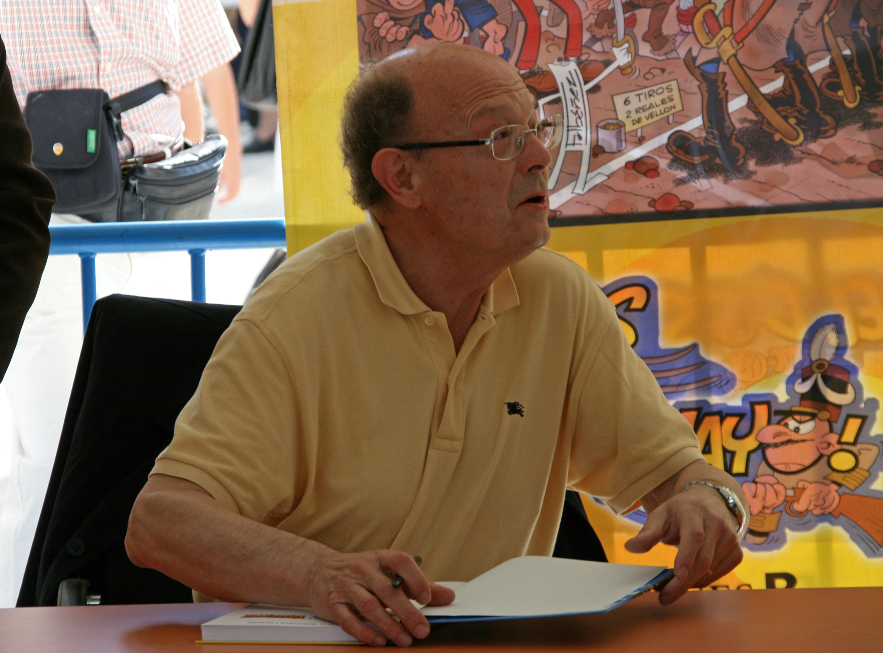 Ibáñez, creador de Mortadelo y Filemón, en la Feria del Libro de Madrid, 6 de junio de 2008.